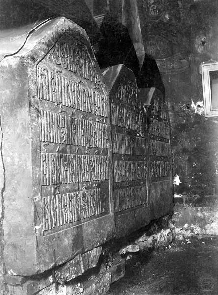 Архангельский собор. Перспектива торцов надгробий Вел. кн. Василия I Дмитриевича (1371-1425), кн. Ивана Ивановича Молодого (до 1473-1490) и кн. Дмитрия Ивановича (1483-1509). Надгробия в 3-ем ряду у южной стены. «б). Верхняя часть каменного гроба, находящаяся под кирпичным надгробием в уровень ныне существующего пола». Фотография К.А.Фишера. 1905 г. Из коллекций Музея архитектуры им. А.В.Щусева. Инв. номер КПоф 4866-71, 72, 73.